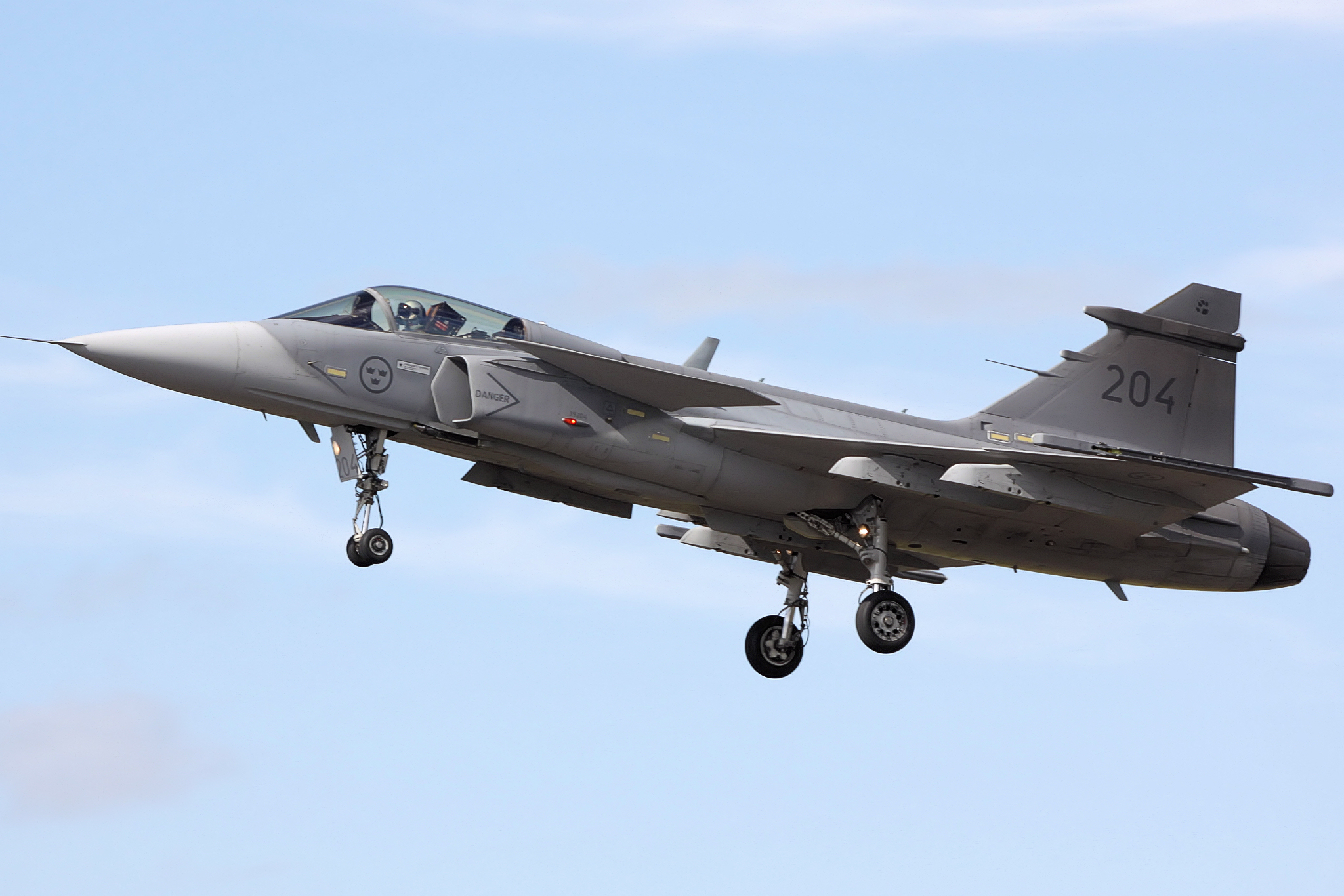 Gripen - RIAT 2009